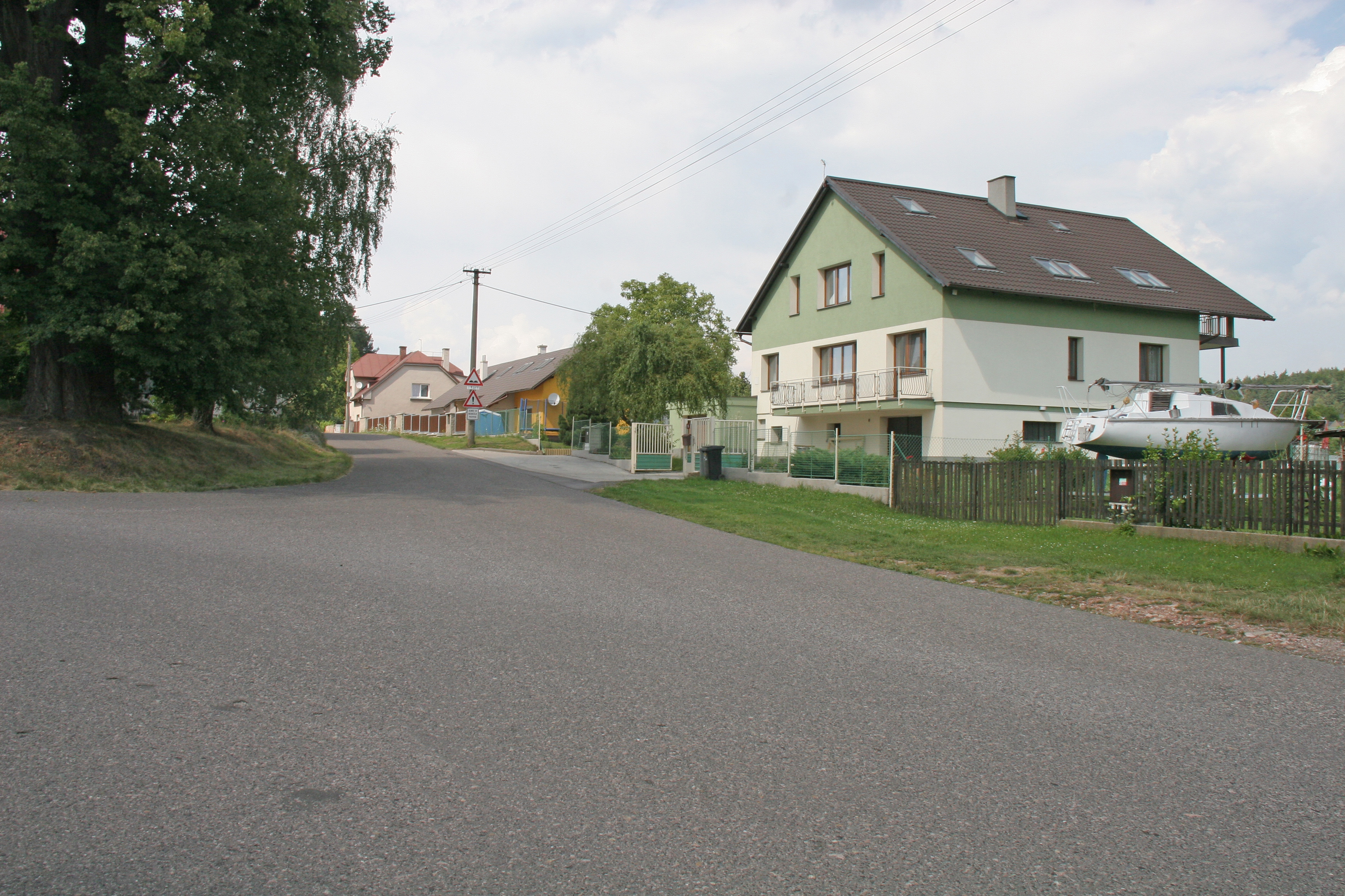 Zábřezí čp. 17